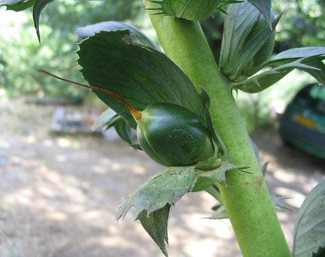 Fruit d'Acanthus mollis. Photo prise à Saint-Michel-de-Llotes en juillet 2004